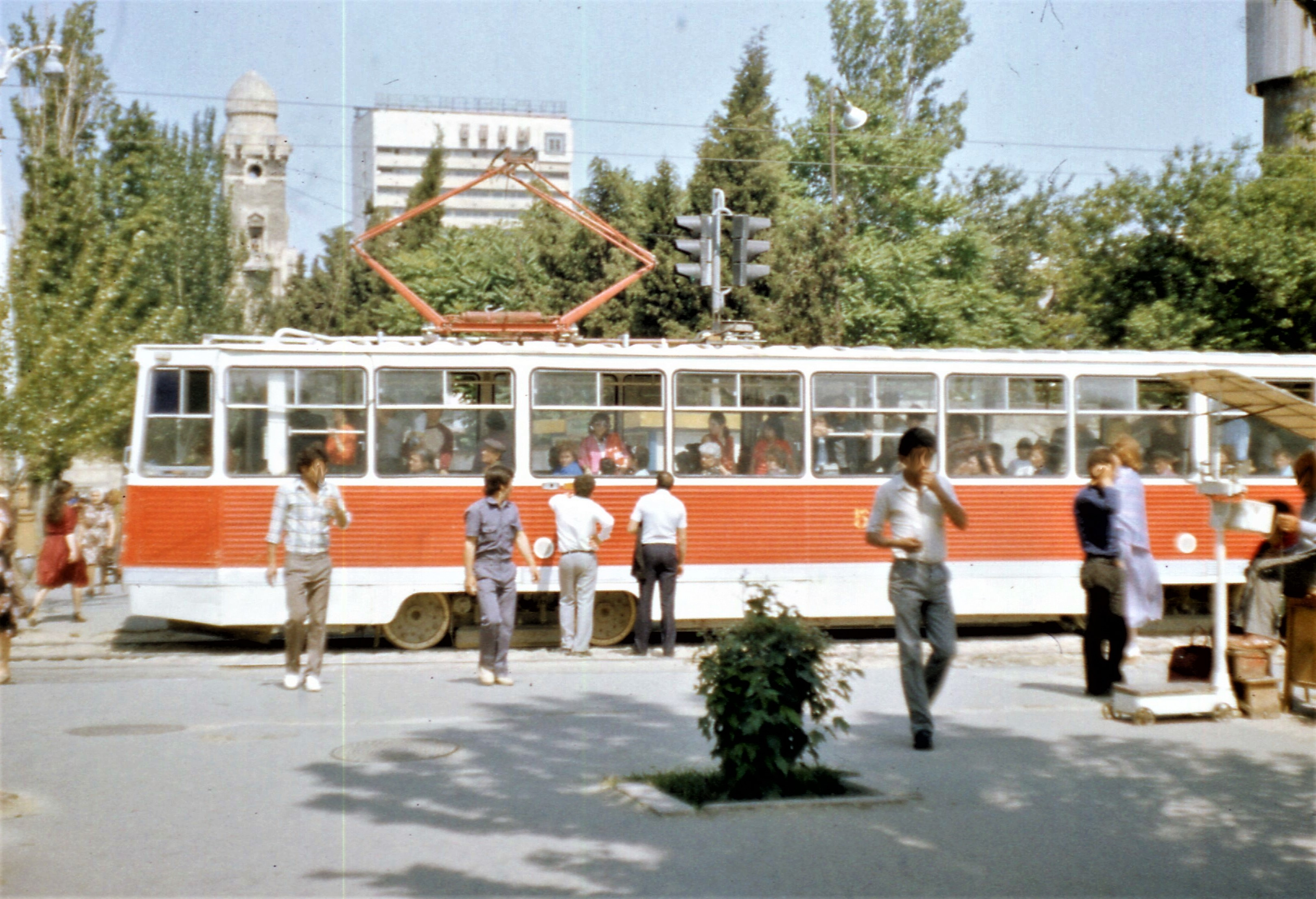 Aserbaidschan 1987